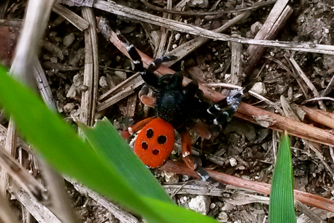 Eresus Kollari mâle vue à Chauffour-lès-Etrechy (91) - France